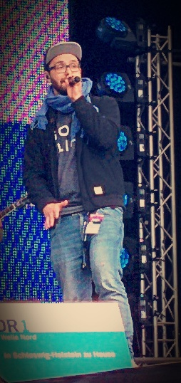 Mark Forster live auf der Kieler Woche 2014